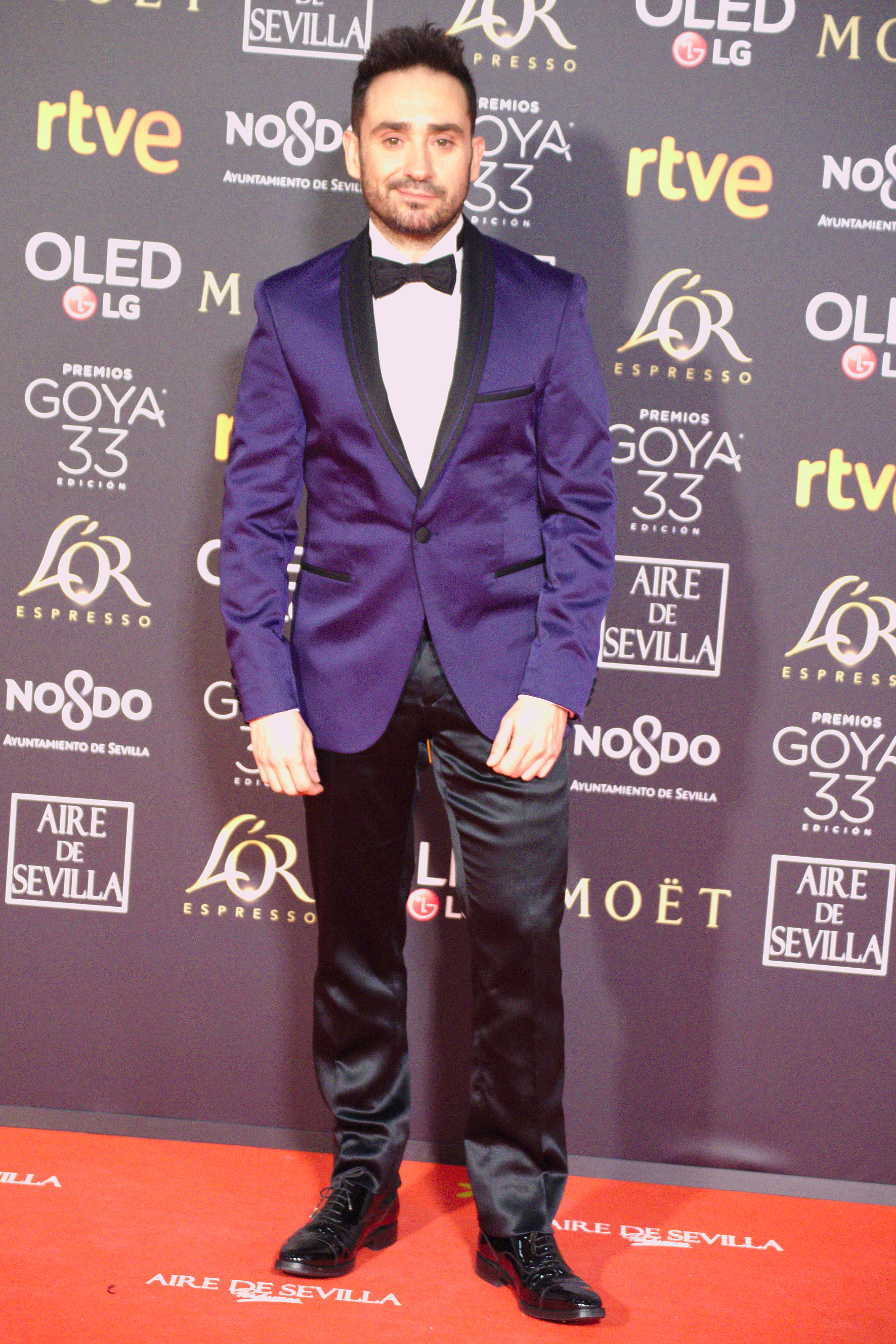 Juanjo Bayona en la alfombra roja de los Premios Goya celebrados en Sevilla en Febrero 2019